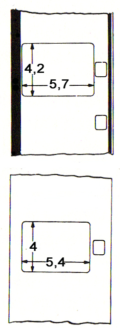 Área deimpresión y área de proyección